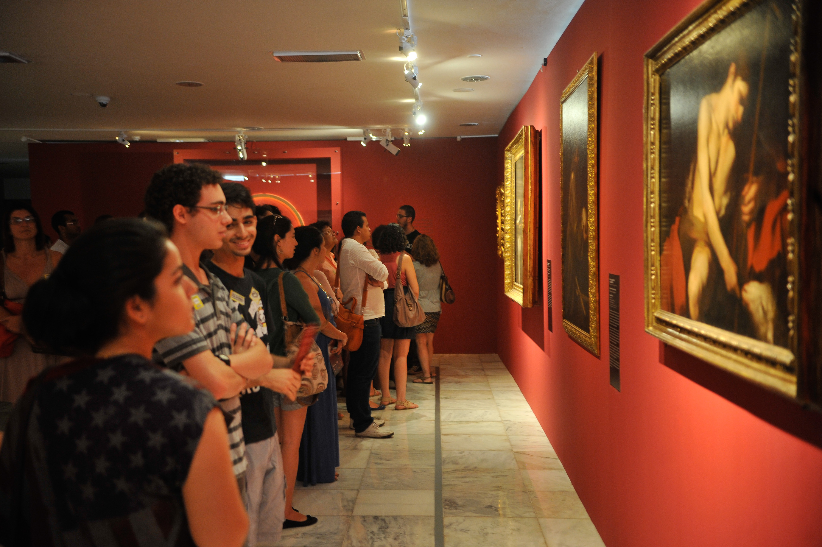 Exposição de obras do pintor barroco italiano Michelangelo Merisi da Caravaggio, no Palácio do Planalto